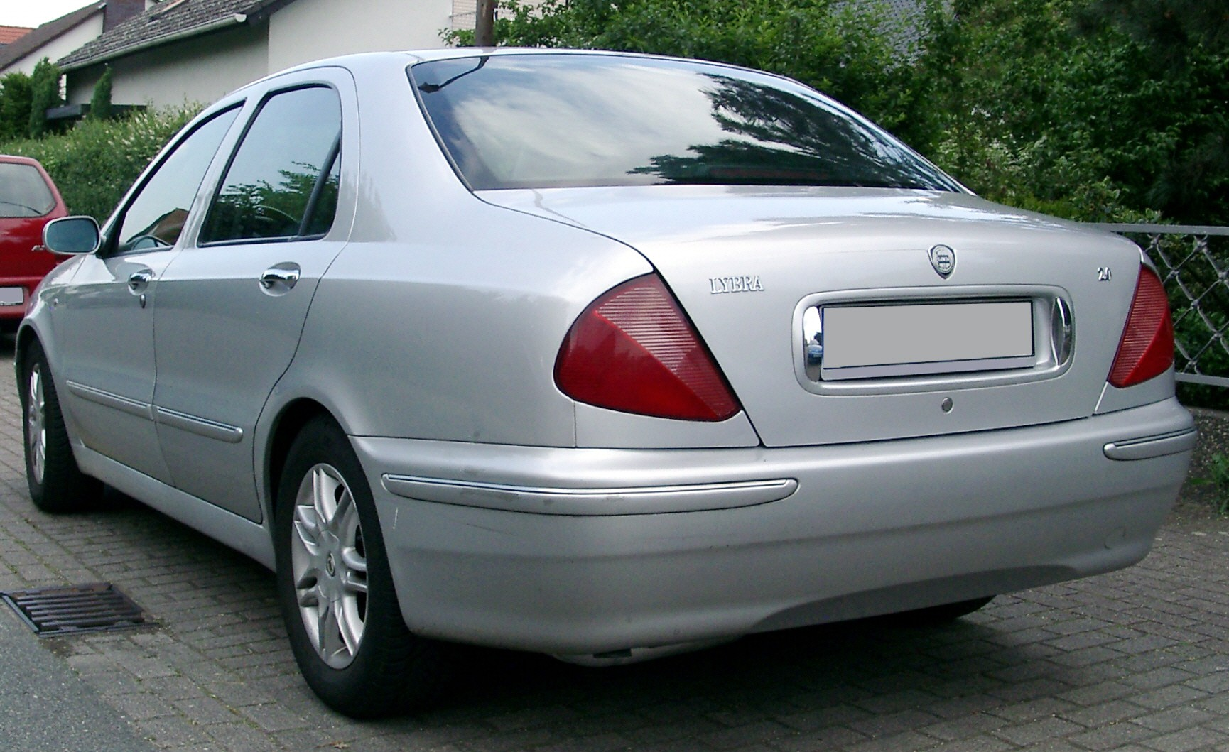 Lancia Lybra Limousine